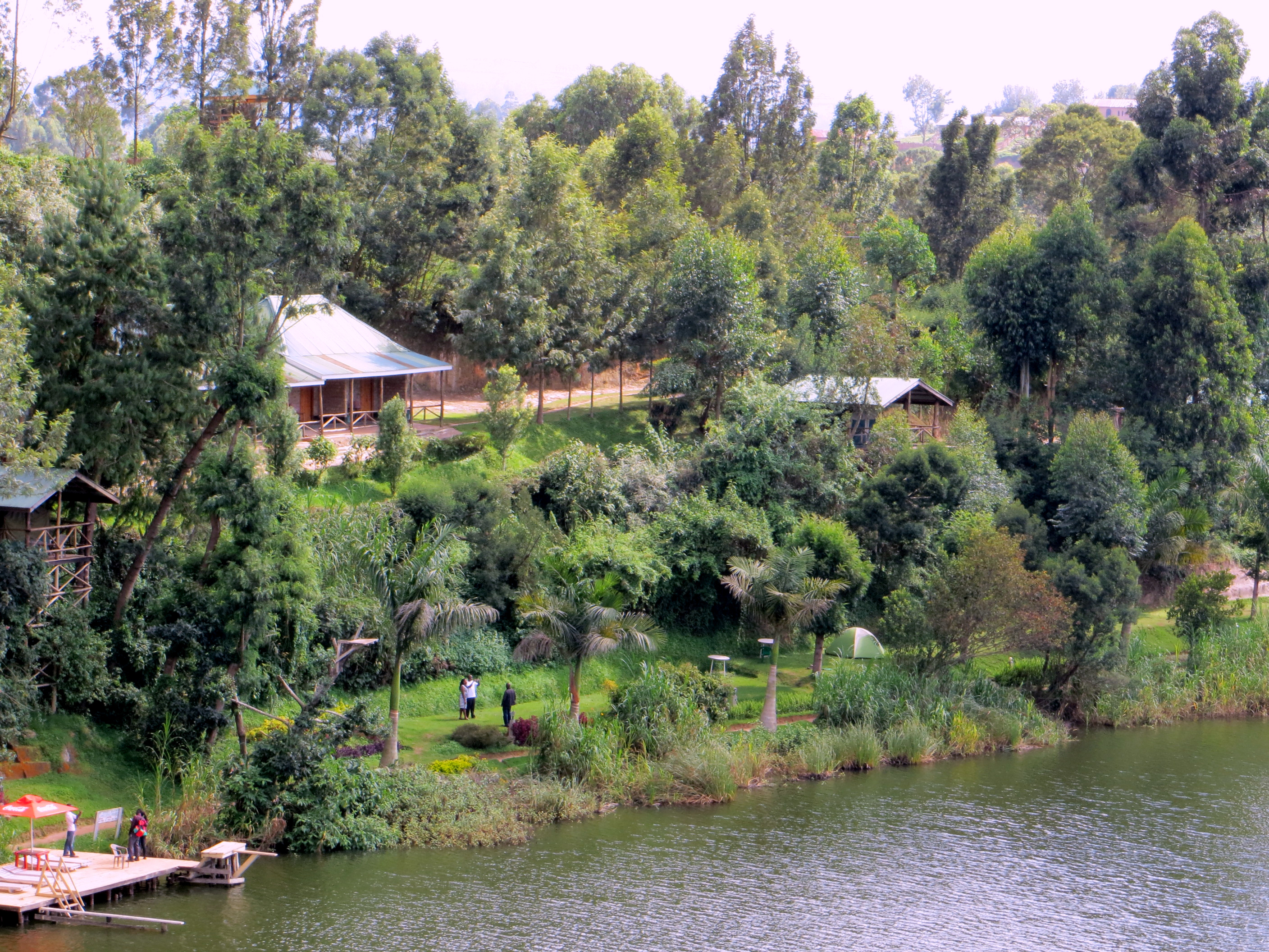 Uganda.